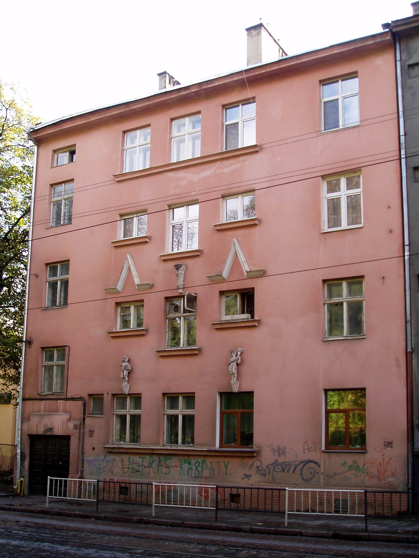 Дім № 37 на вулиці Вітовського у Львові. Збудований 1928 року за проектом Юзефа Авіна (1883-1942/43).